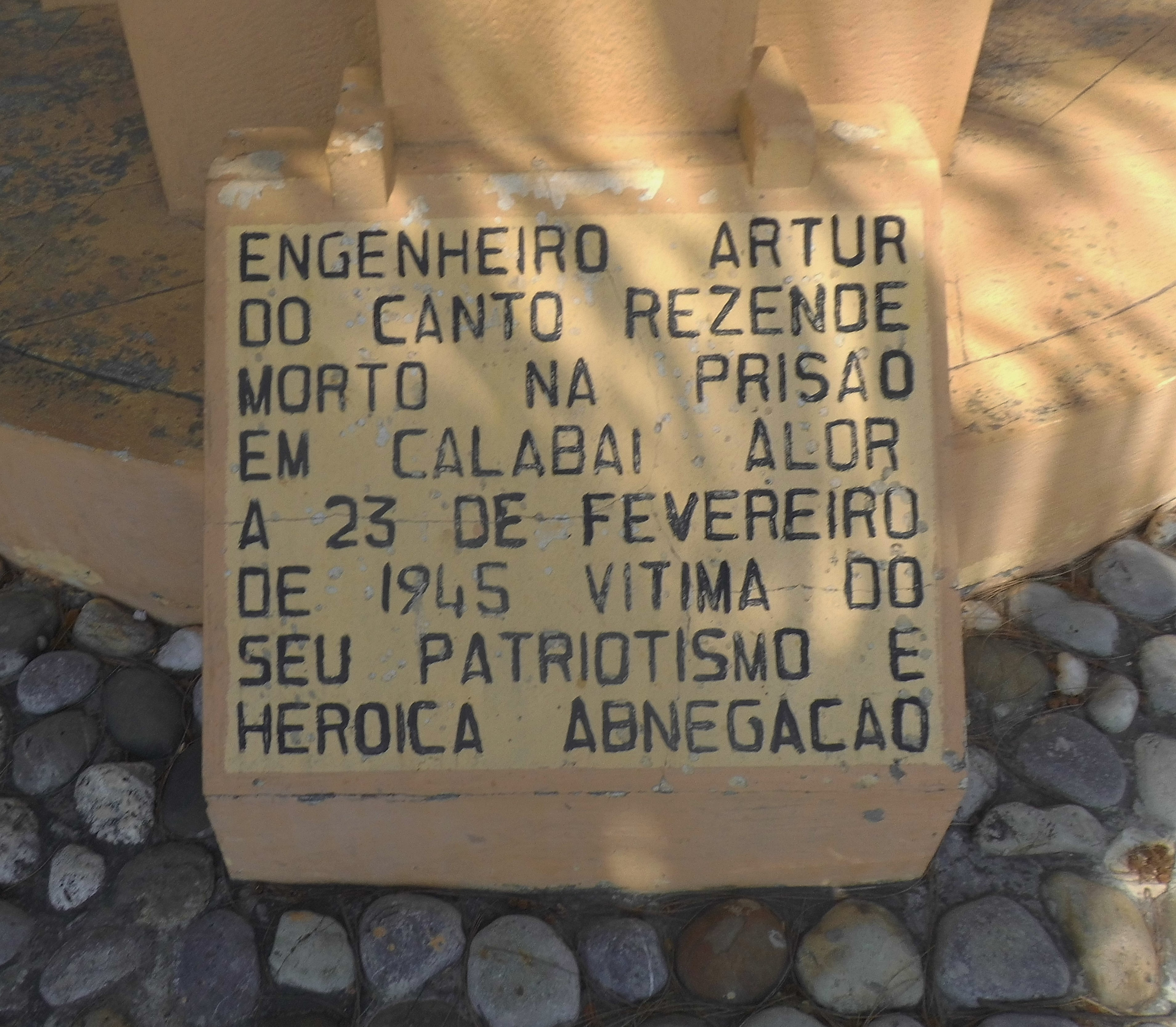 Denkmal für Engenheiro do Canto Rezende